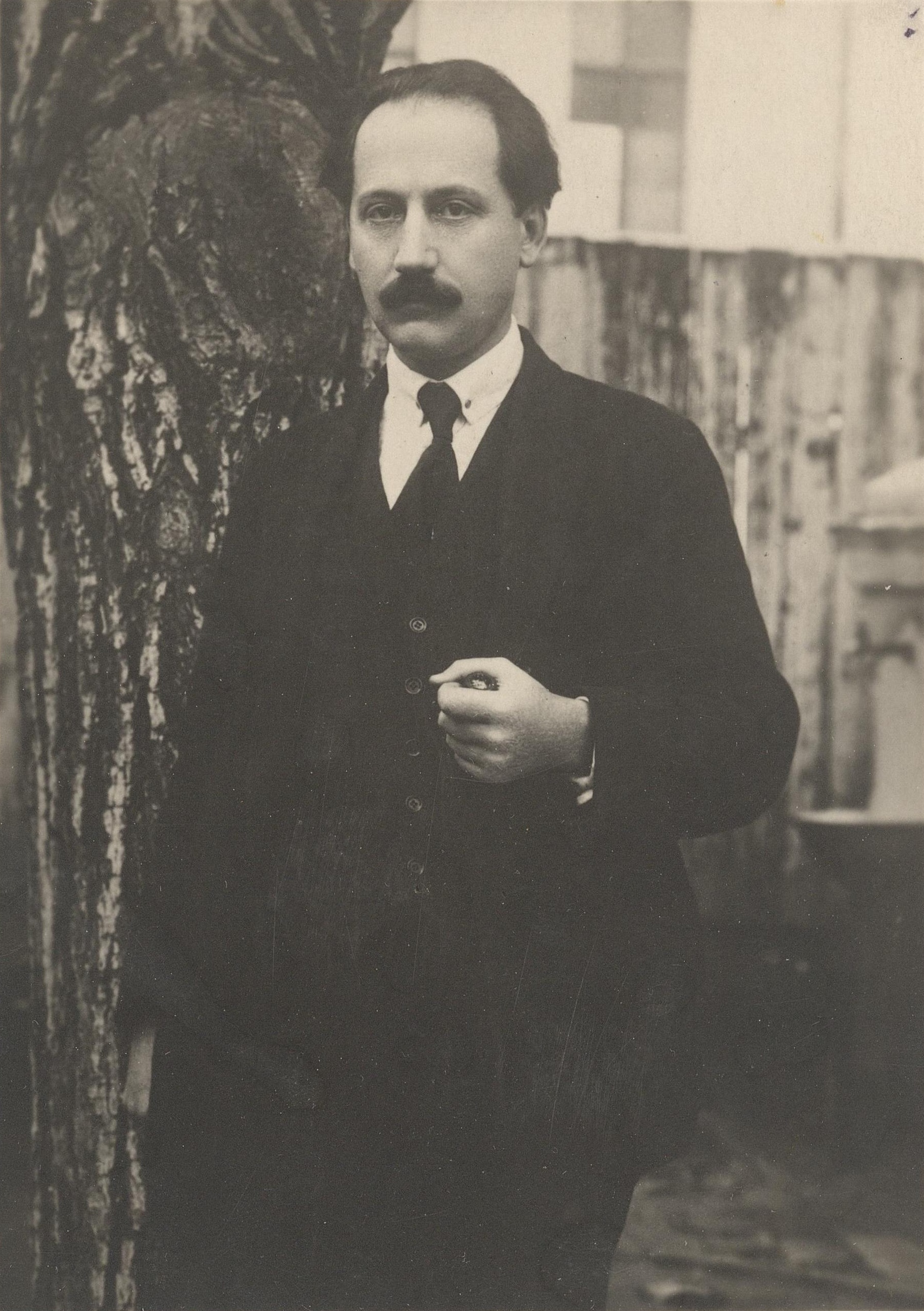 Коста Новаковић (1866-1938), политичар и публициста.